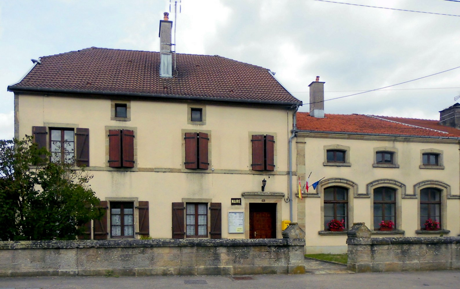 La mairie de Saint-Julien